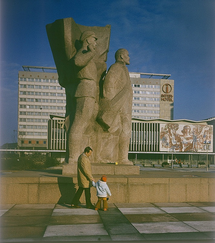 Original image description from the Deutsche FotothekDresden. Leninmonument auf der Prager Straße